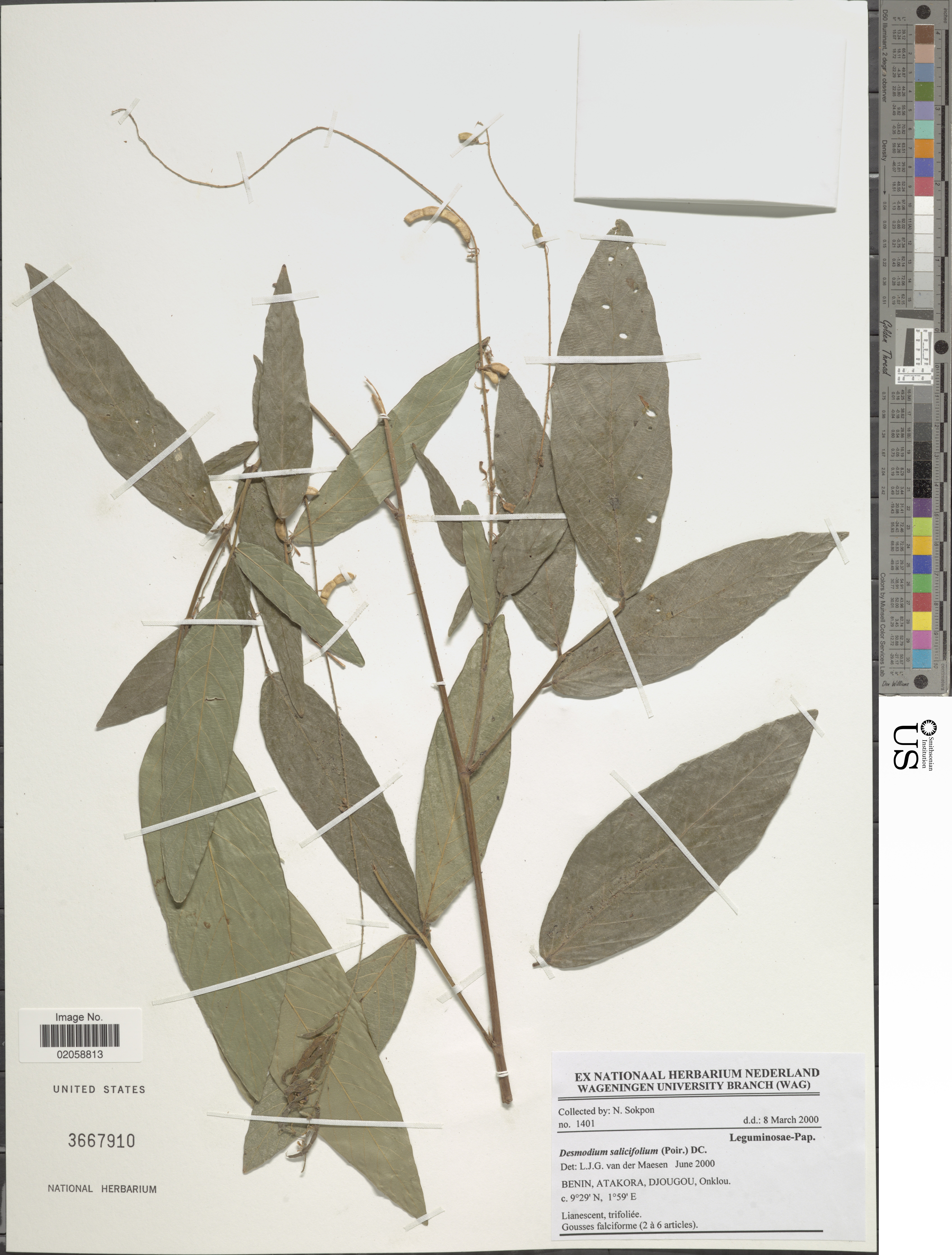 Desmodium salicifolium (Poir.) DC. Object Details Biogeographical Region 22 - West Tropical Africa Collector N. Sokpon Record Last Modified 29 Dec 2017 Specimen Count 1 Collection Date 8 Mar 2000 Barcode 02058813 USNM Number 3667910 Place Djougou, Onklou, Atakora, Benin, Africa Published Name Desmodium salicifolium (Poir.) DC. Taxonomy Plantae Dicotyledonae Rosales Fabaceae Faboideae NMNH - Botany Dept. Record ID nmnhbotany_13473449 Usage of Metadata (Object Detail Text) CC0 GUID (Link to Original Record)